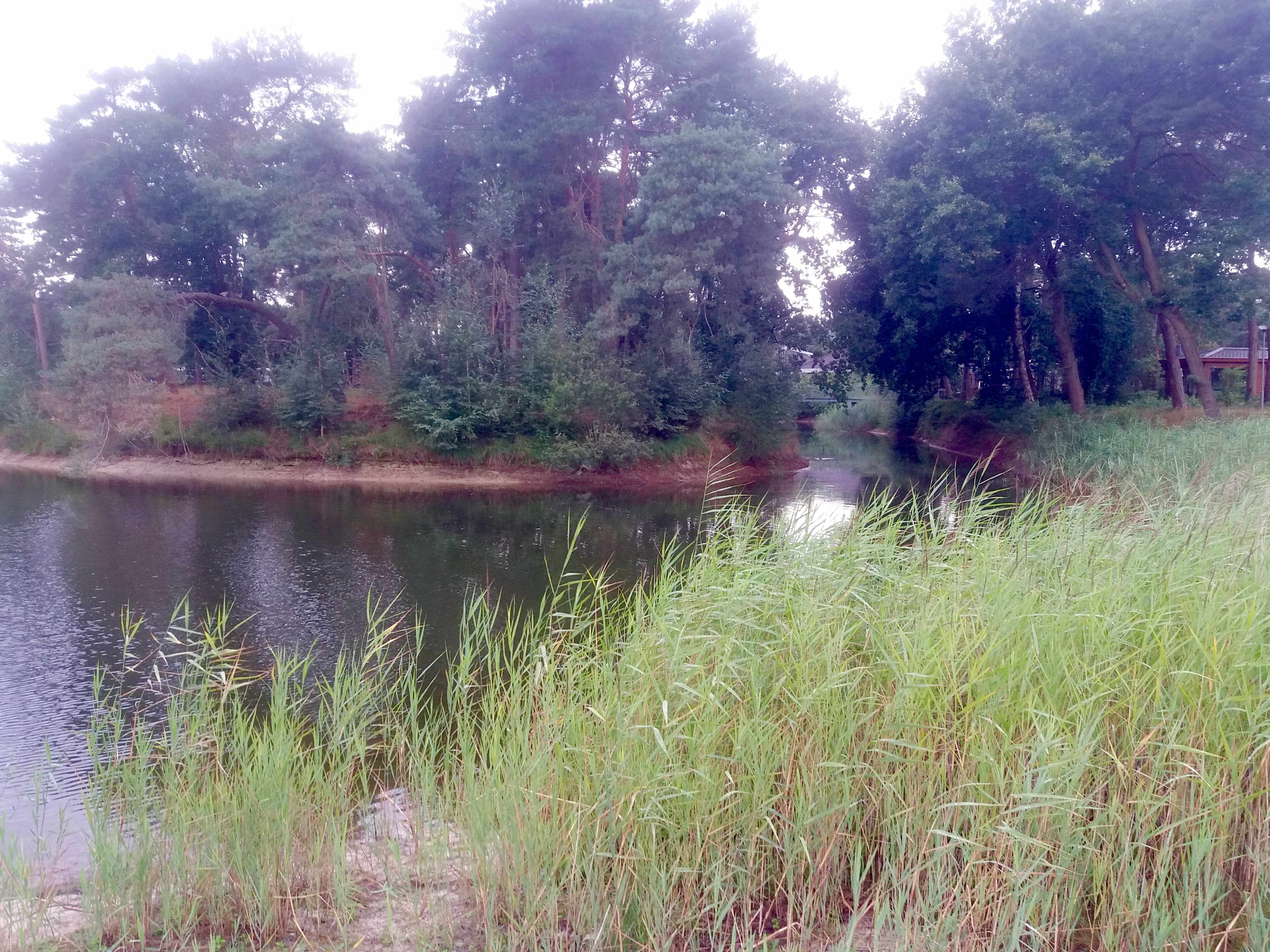 Zicht op achterlangsloop gezien vanaf de oostzijde. Zomer 2020.